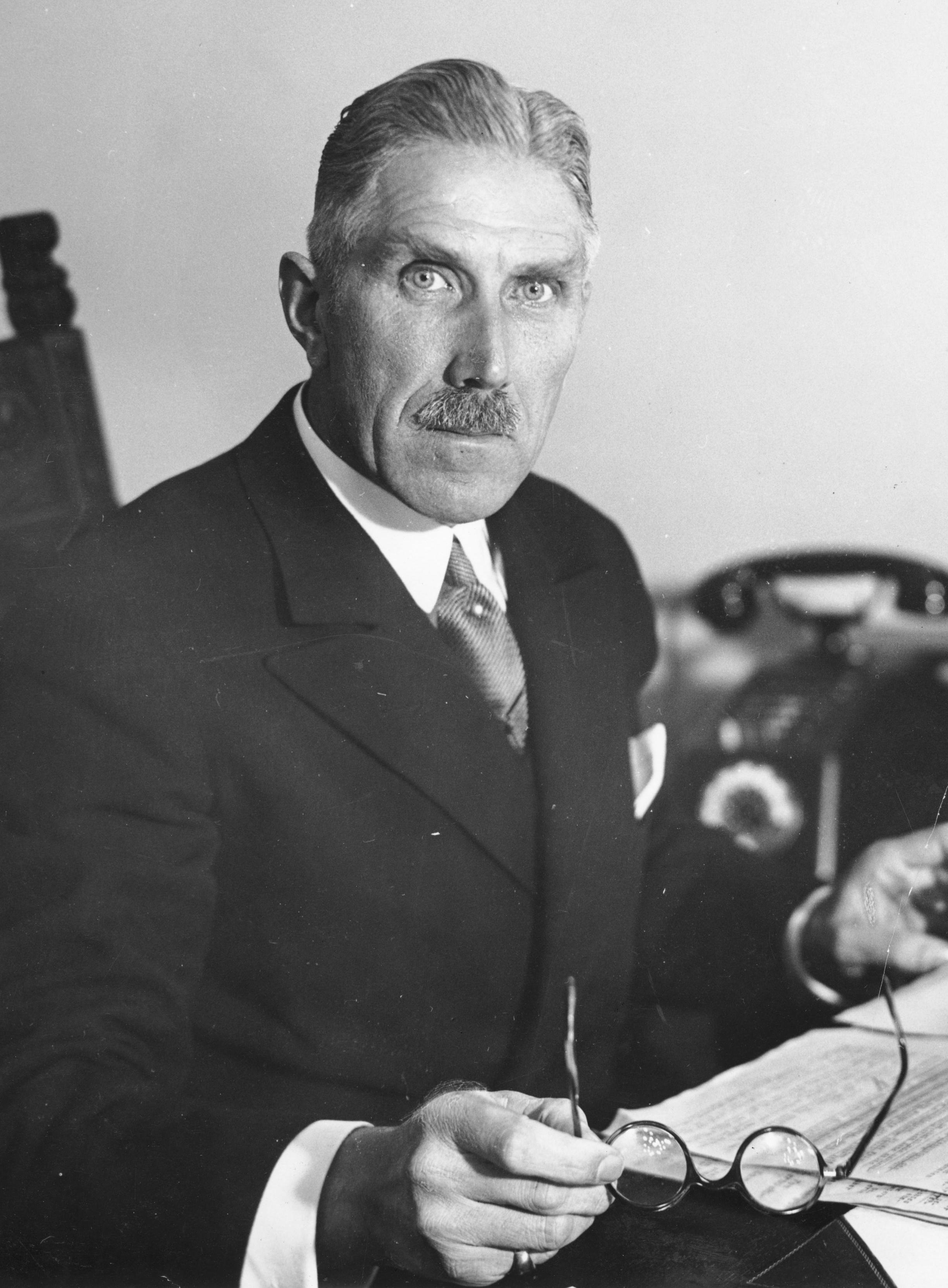 Geburtstag des Vizekanzlers. Der Stellvertreter des Reichskanzlers, Vizekanzler Franz von Papen, wird am 29.10. 54 Jahre alt. Herr von Papen, der sich um die Einigung des nationalen Deutschland ein historisches Verdienst erworben hat, ist gebürtiger Westfale und war zunächst aktiver Offizier, 1913 Hauptmann im Grossen Generalstab, 1914-16 Militär-Attachè in Washington und in Mexiko. In den beiden letzten Kriegsjahren nahm Herr von Papen am Feldzug teil und war zuletzt Oberstleutnant und Chef des Stabes der 4. Osmanischen Armee. Als Mitglied des Zentrums hat er dem Preussischen Landtag von 1920 bis 1928 und von 1930 - 1932 angehört. Am 1. Juni 1932 übernahm Herr von Papen auf Wunsch des Reichspräsidenten das Reichskanzleramt, das er bis zum 2. Dezember innehatte. Seit dem 30. Januar 33 , dem Tag der Amtsübernahme der Regierung Hitler, ist Herr von Papen Stellvertreter des Reichskanzlers. 37161-33 Information added by Wikimedia users.Portrait of Franz von Papen. Image cropped and subjected to the following changes (decreased brightness, increased photo quality) by Emiya1980 using Photo Editor at